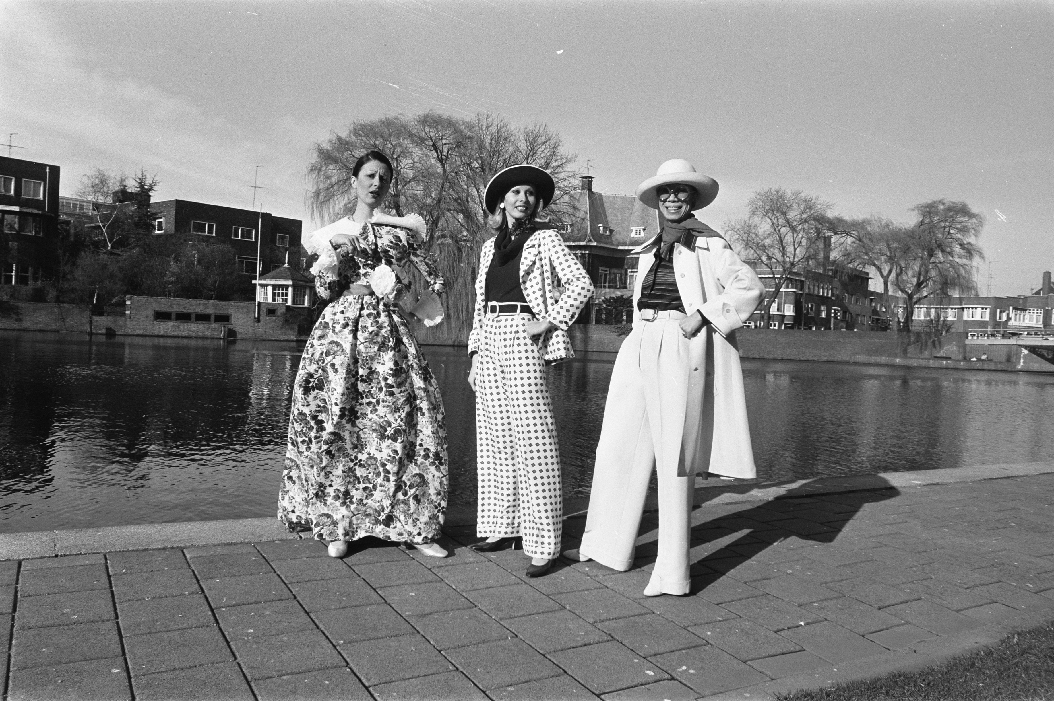 Collectie / Archief : Fotocollectie Anefo Reportage / Serie : [ onbekend ] Beschrijving : Mannequins tonen mode van Nina Ricci in Hiltonhotel Datum : 22 maart 1972 Trefwoorden : MANNEQUINS, MODE Instellingsnaam : Hiltonhotel, Ricci, Nina Fotograaf : Verhoeff, Bert / Anefo Auteursrechthebbende : Nationaal Archief Materiaalsoort : Negatief (zwart/wit) Nummer archiefinventaris : bekijk toegang 2.24.01.05 Bestanddeelnummer : 925-4763